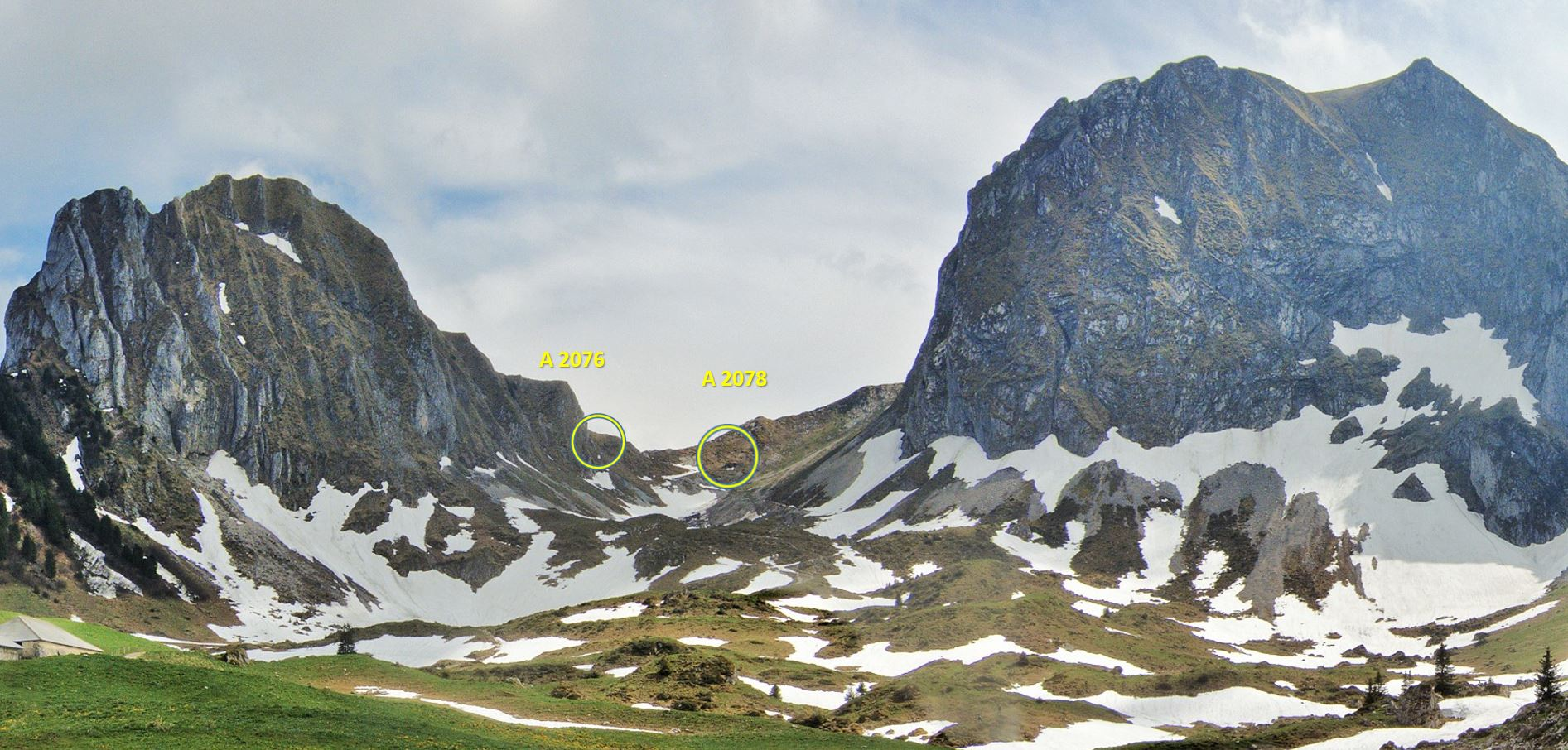 Nüneneflue - Leiterepass - Gantrisch BE, Schweiz